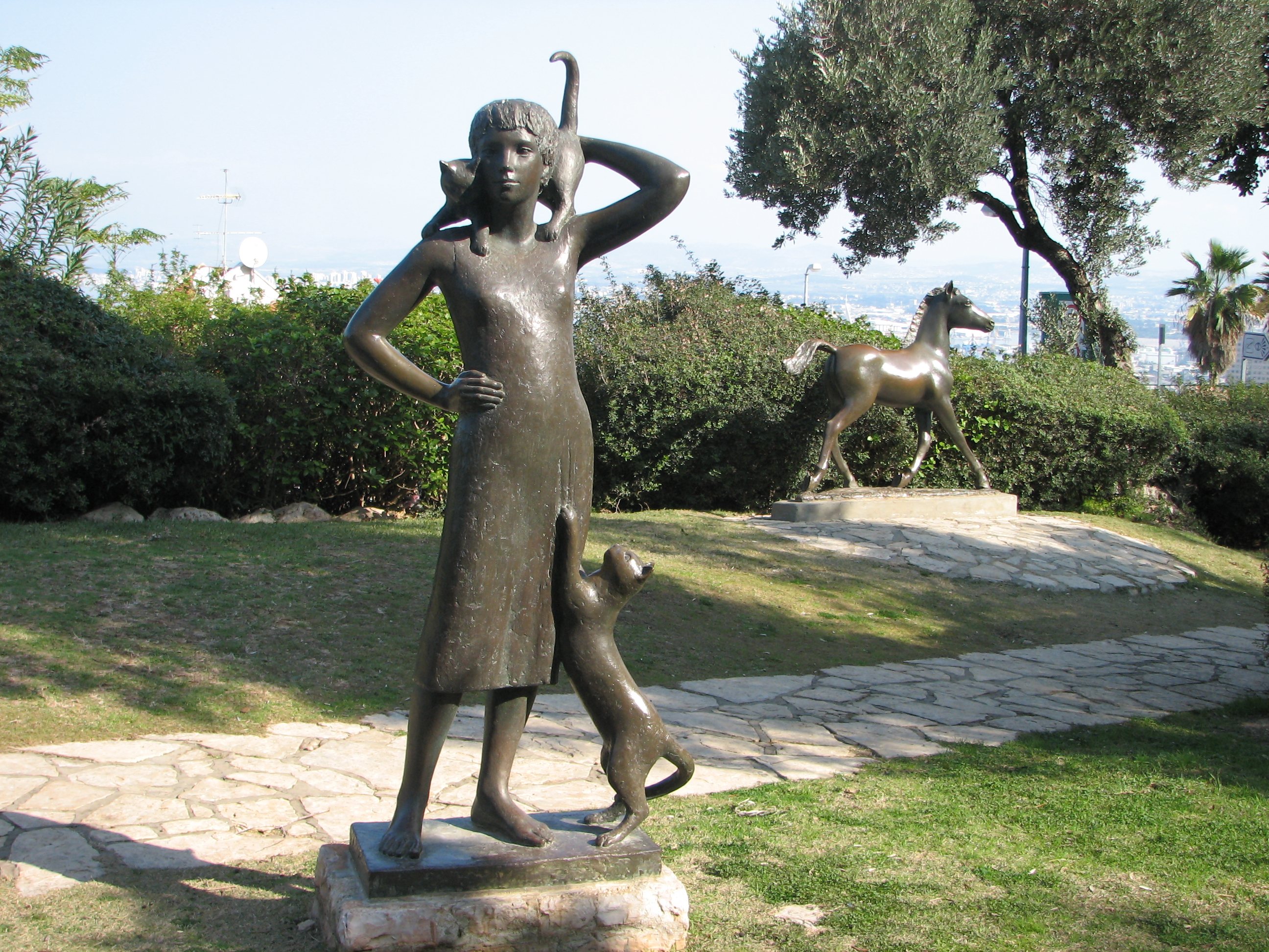 אורסולה מלבין (Ursula Malbin) היא פסלת ישראלית. נולדה בשנת 1917 בברלין בירת גרמניה למשפחה של רופאים. בשנת 1939 נמלטה לז'נבה שבשווייץ ובה למדה באקדמיה לאמנות והחלה את דרכה האומנותית. במהלך לימודיה פגשה את הפסל הנרי פיקוט (או פאגוט) ונישאה לו. פסלים מתוך גן הפסלים שהקימה בכספה . הגן נמצא בשדרות התיונות 144 פינת רחוב ה- 2 בנובמבר בחיפה ישראל